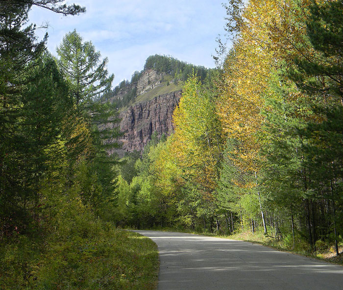 Путь в Шаманку.